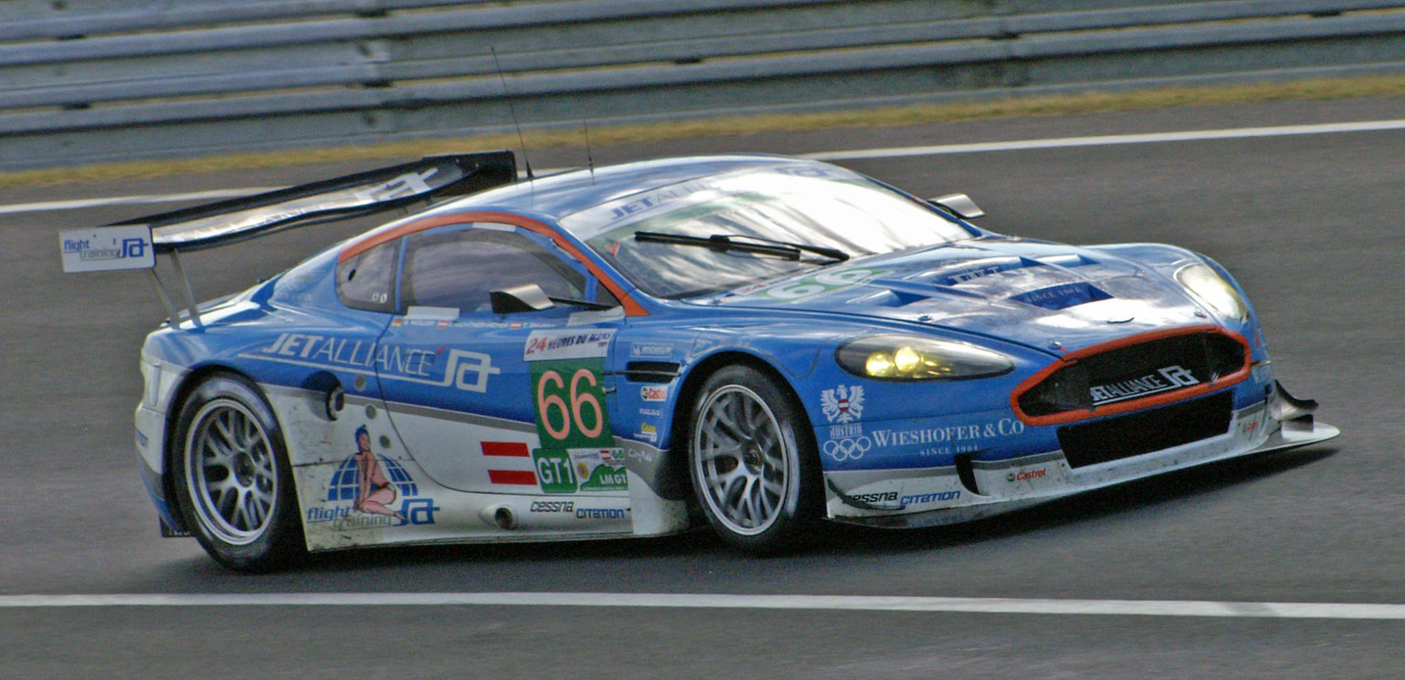 L'Aston Martin DBR9 de Jatalliance racing au Mans 2009